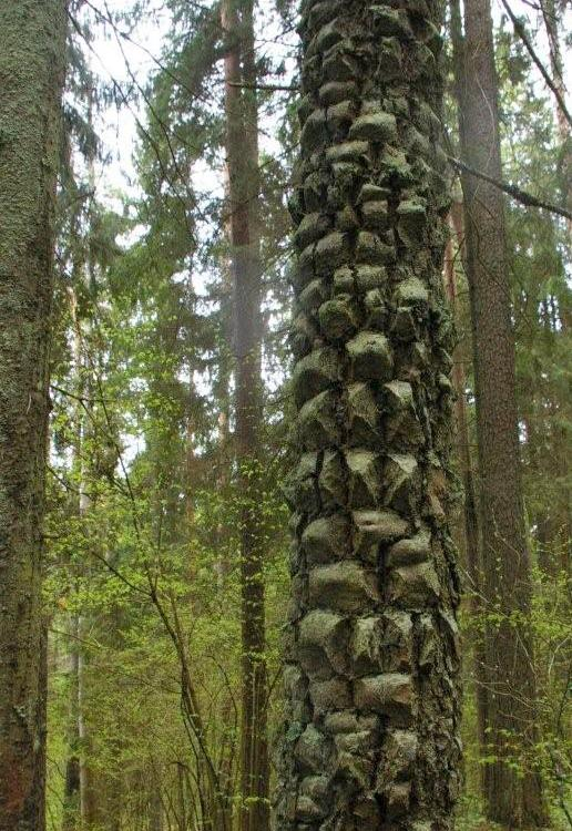 Stamm der estnishen "Krokodilpanzer-Fichte"